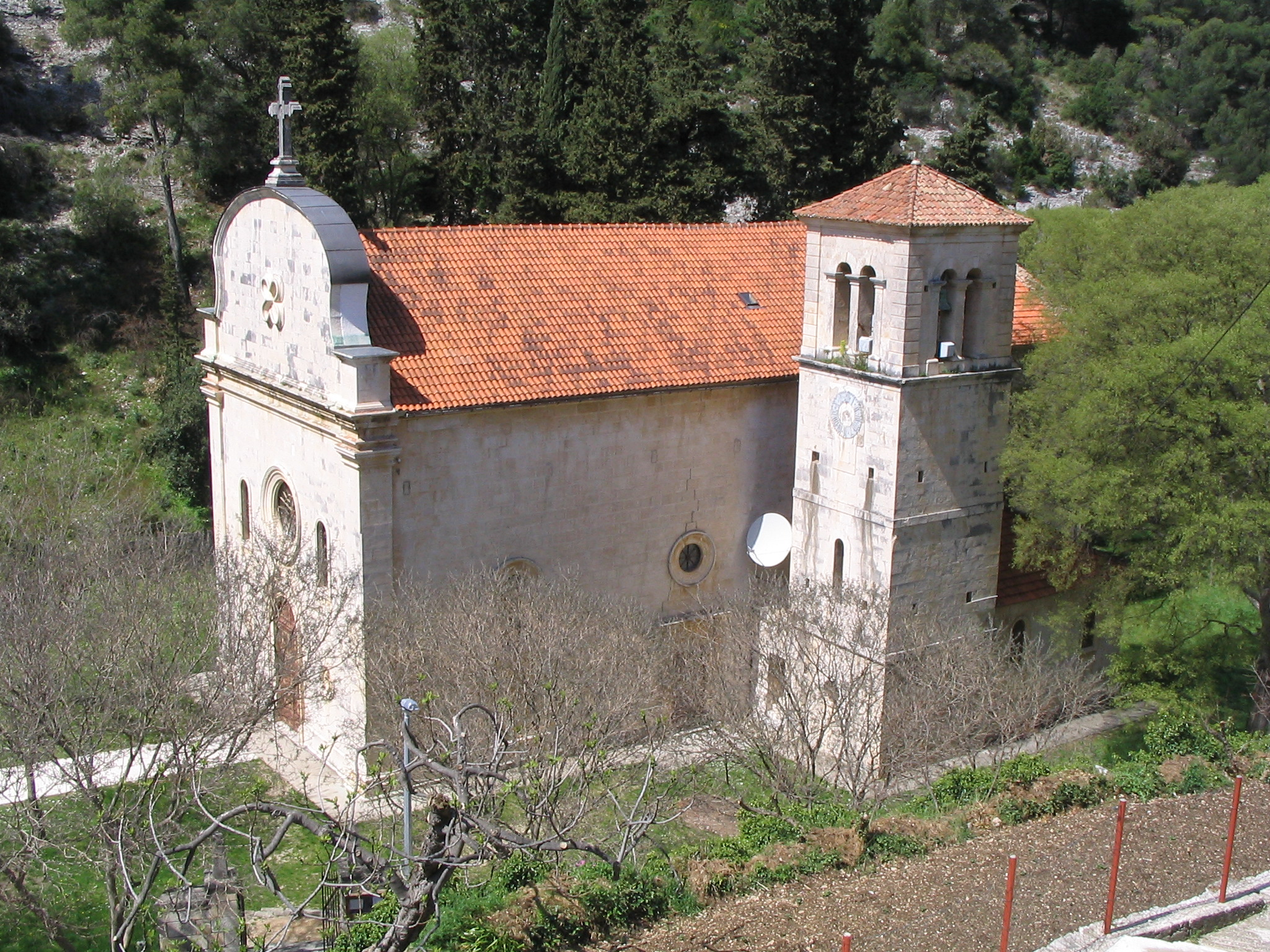 Crkva Očišćenja Blažene Djevice Marije, Dol, Brač, Croatia- spomenik identifikacija: Z-4997.